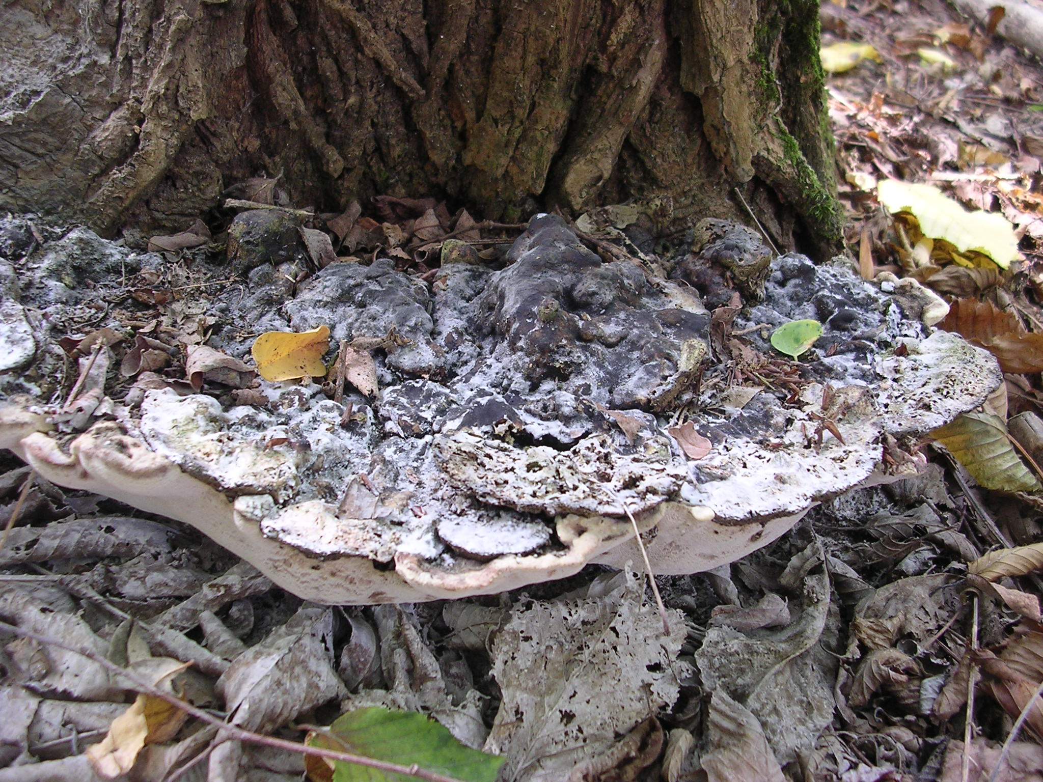 Piemontèis: Perenniporia Fraxinea (Bull.) Ryvarden